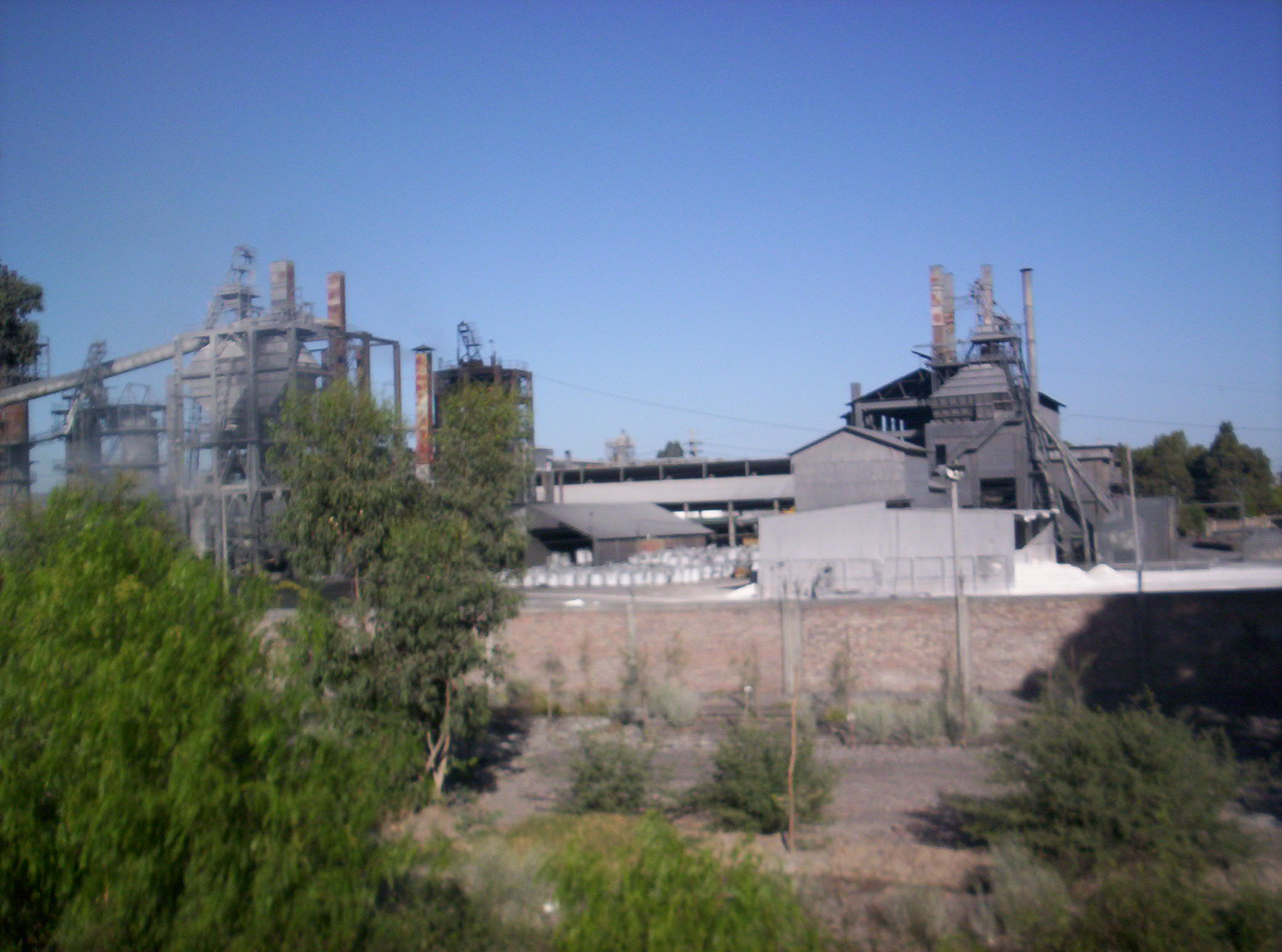 Vista a una de las fábricas ubicadas en el departamento Chimbas, provincia de San Juan, Argentina.